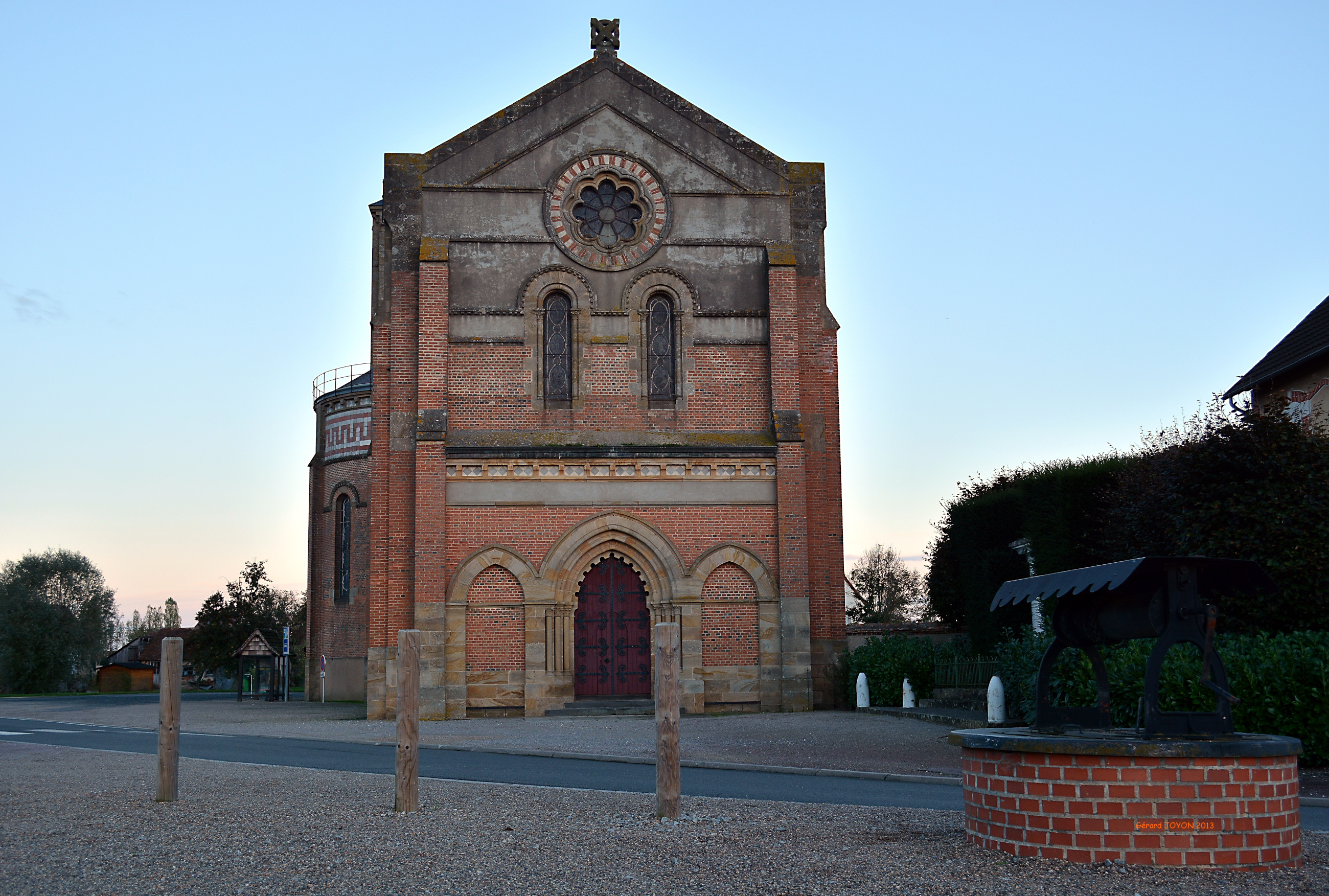 Vue du porche.